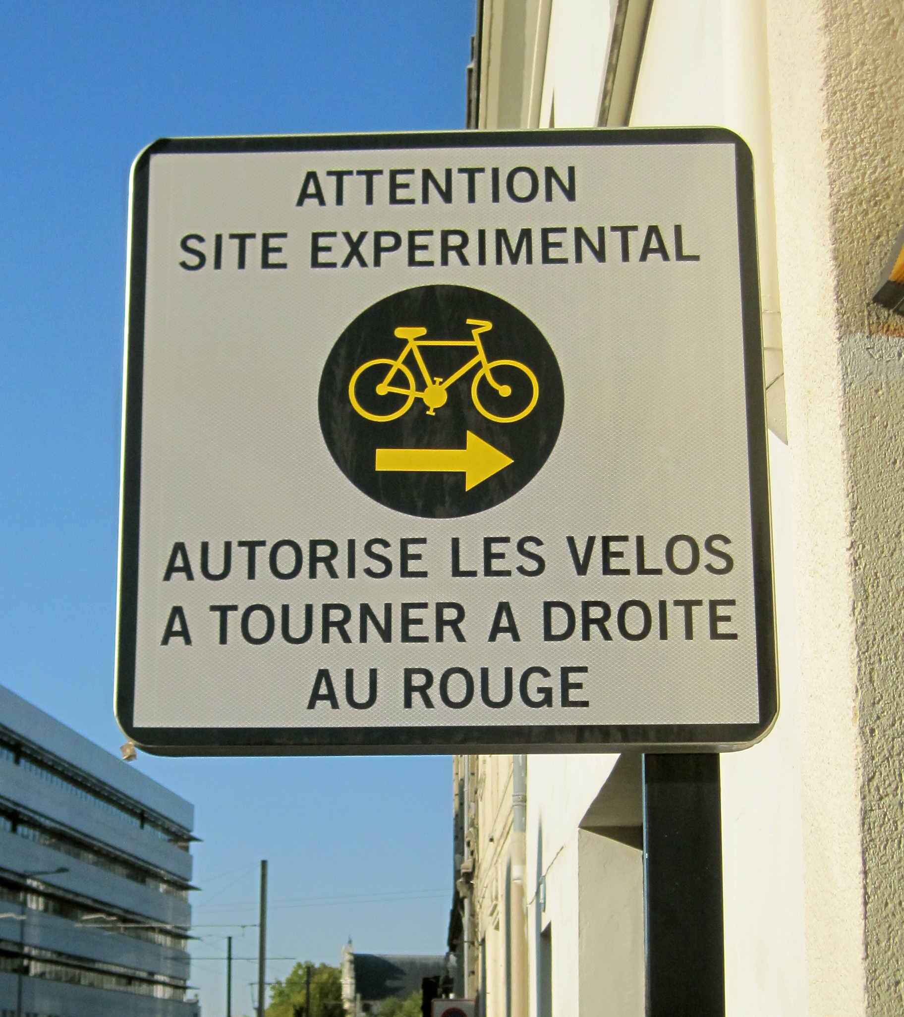 Panneau de l'expérimentation autorisant le « tourne à droite » des cycliste au feu rouge. Bordeaux, rue François de Sourdis.